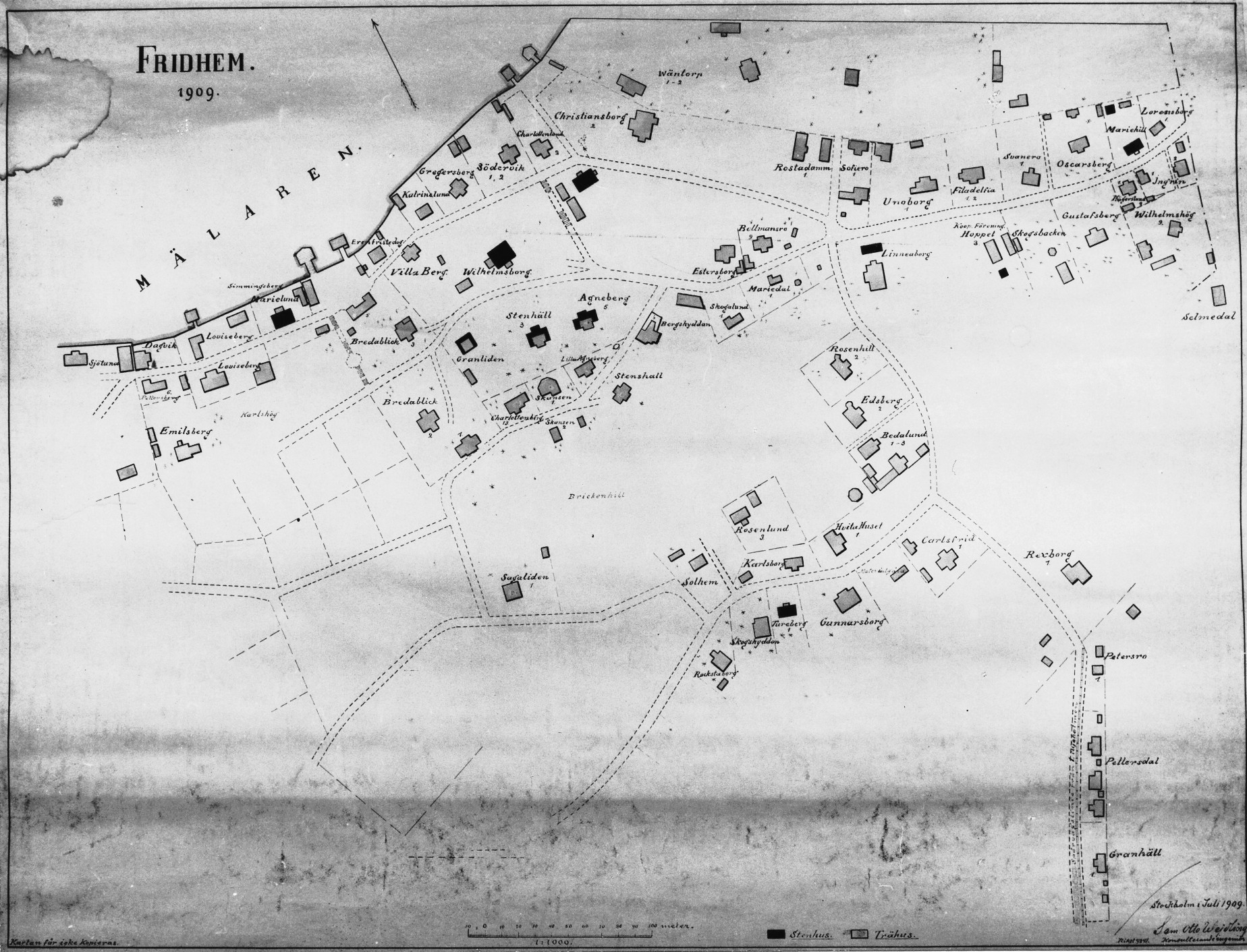 Fridhems villor (svart i fyllda hus är stenhus)